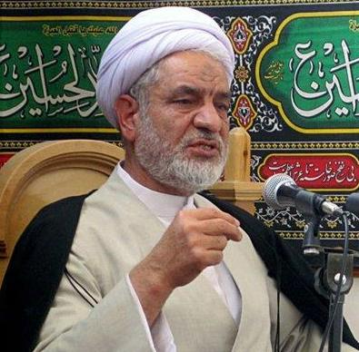 علی عجم